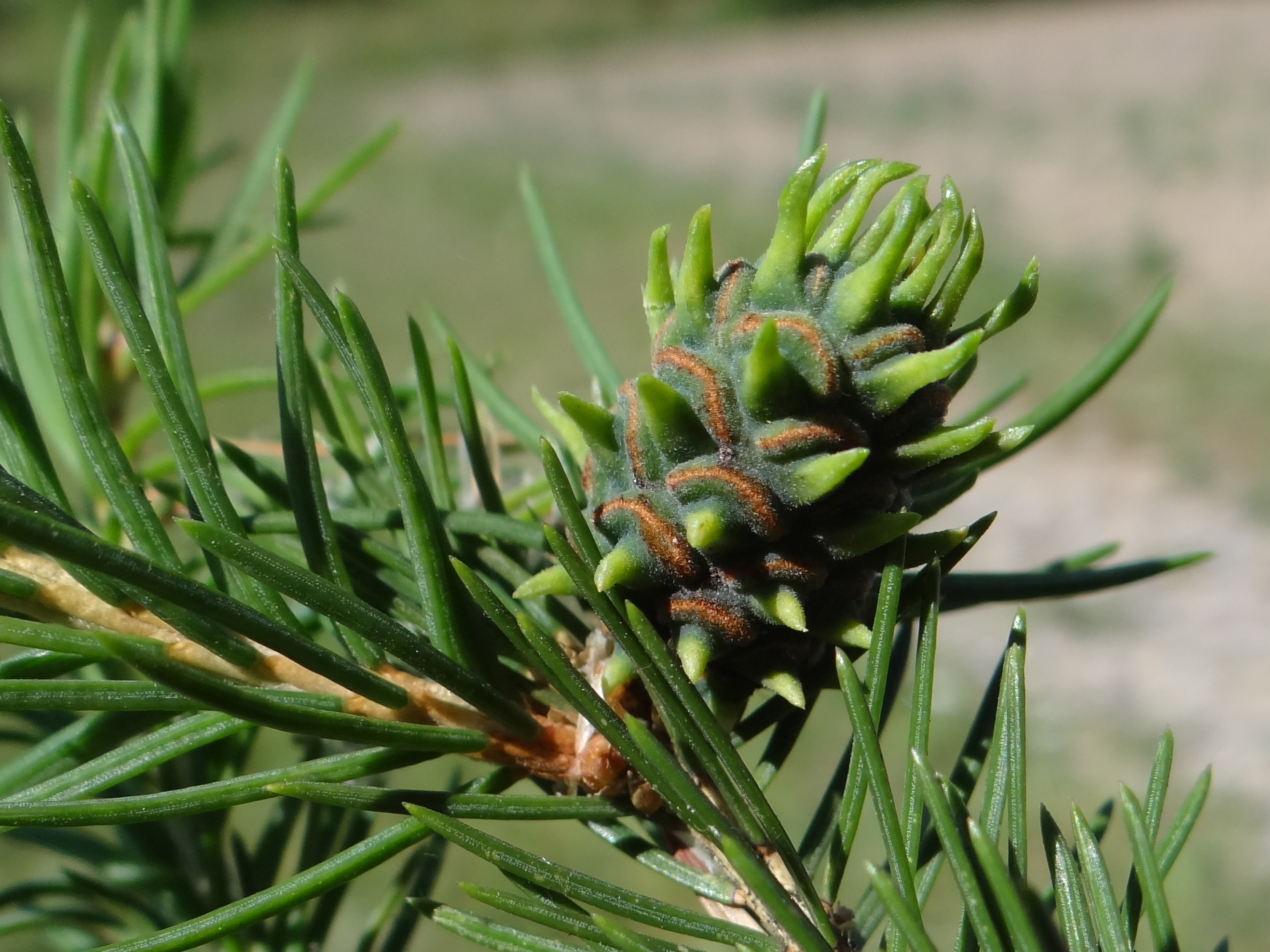 Adelges laricis on Picea abies. Location: Poland, Bębło